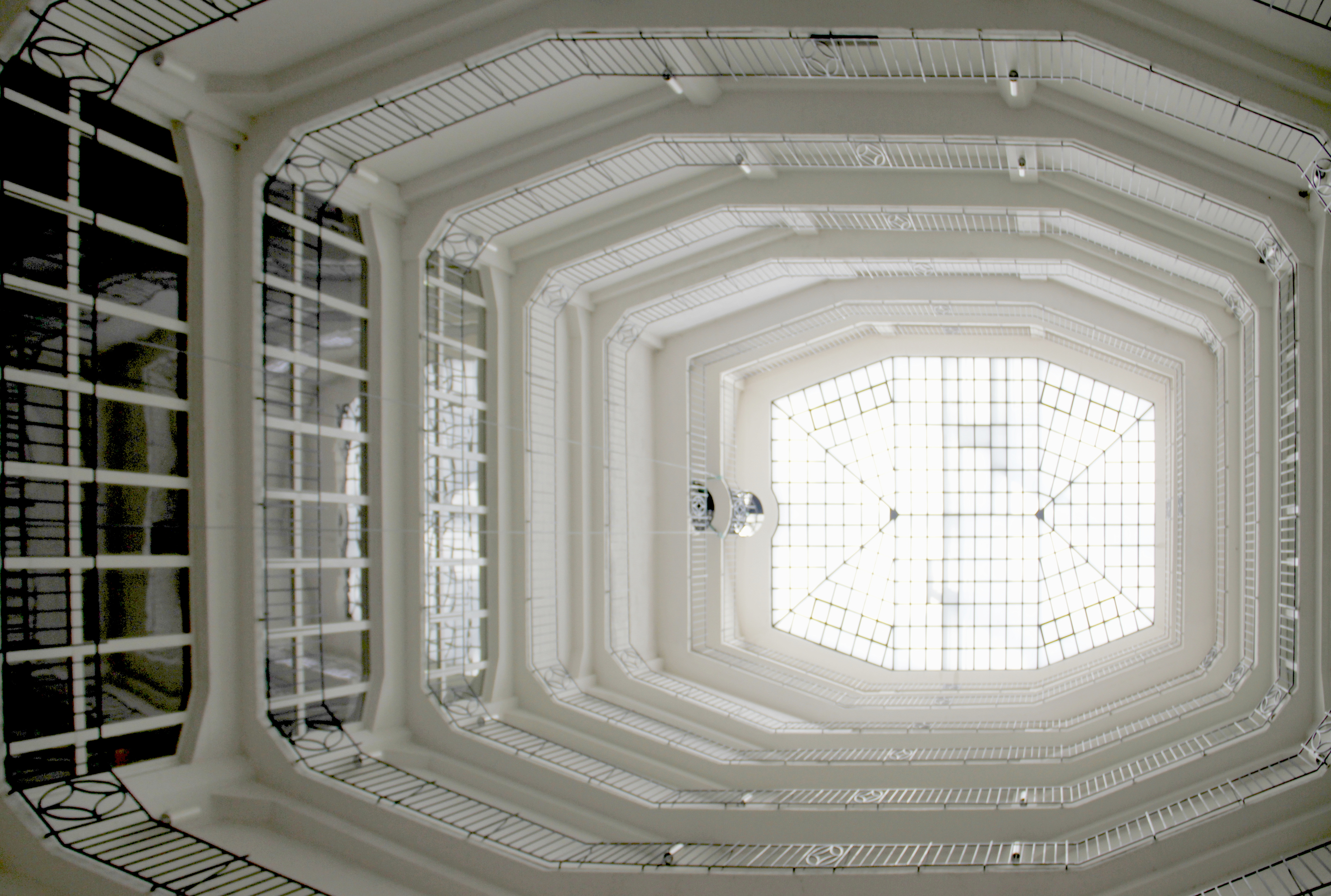 Hauptzollamt München, Lichtschacht. 45 Meter hoch, davon 18 Meter über dem Dachgiebel. Erbaut 1912